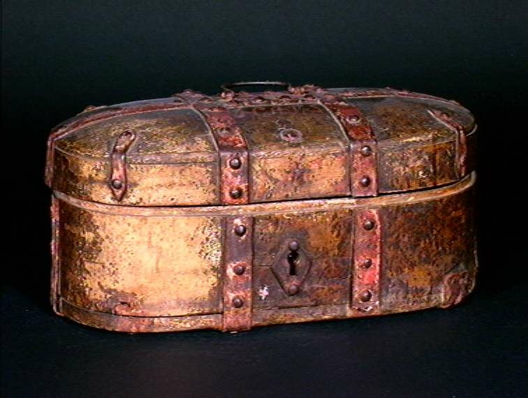 Sveipet bomme av furu, datert 1800, fra Rindal i Møre og Romsdal. Foto: Anne-Lise Reinsfelt / Norsk Folkemuseum, NF.1927-1059.